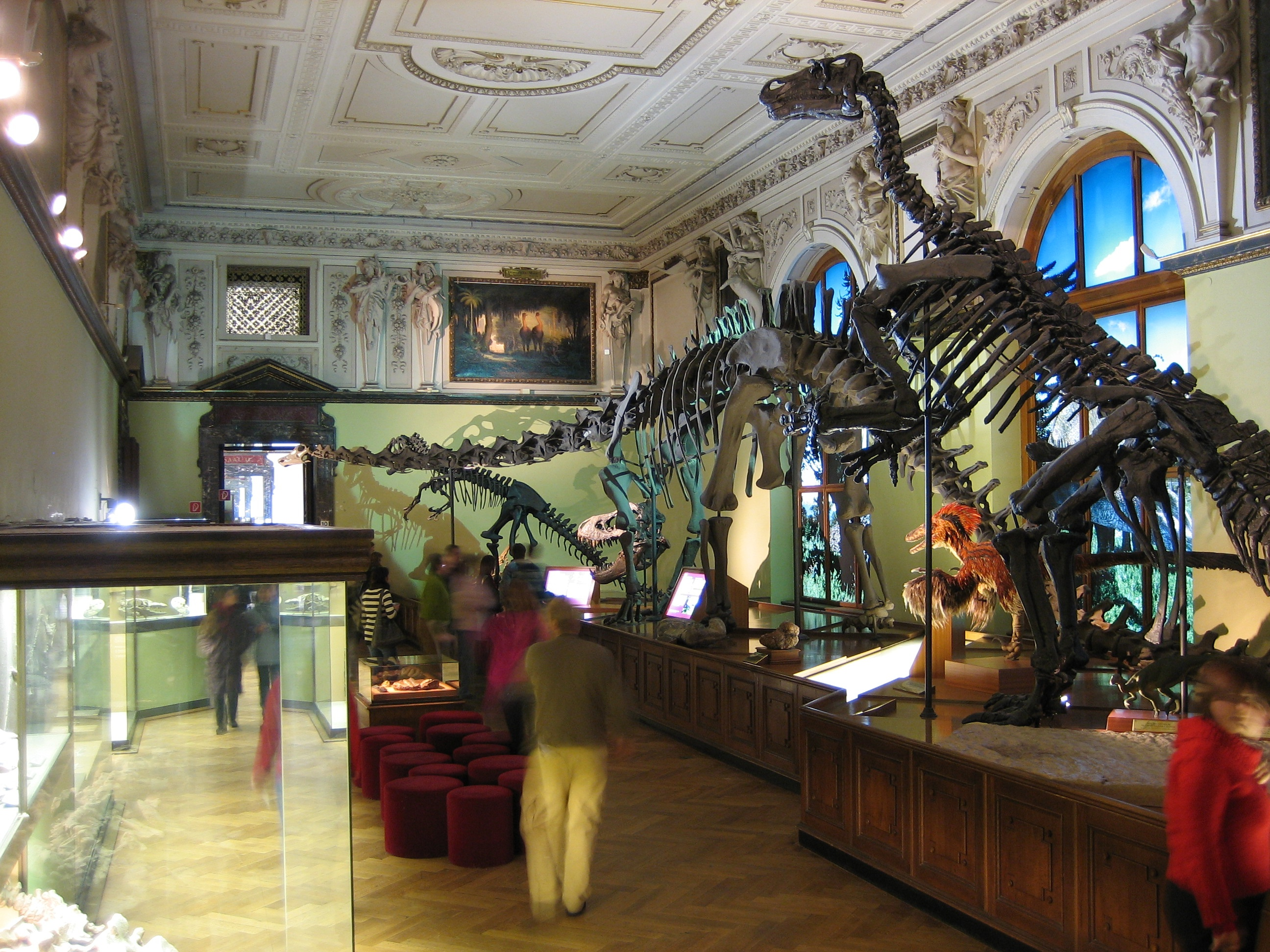 Wien Naturhistorisches Museum Dinosaurierabteilung